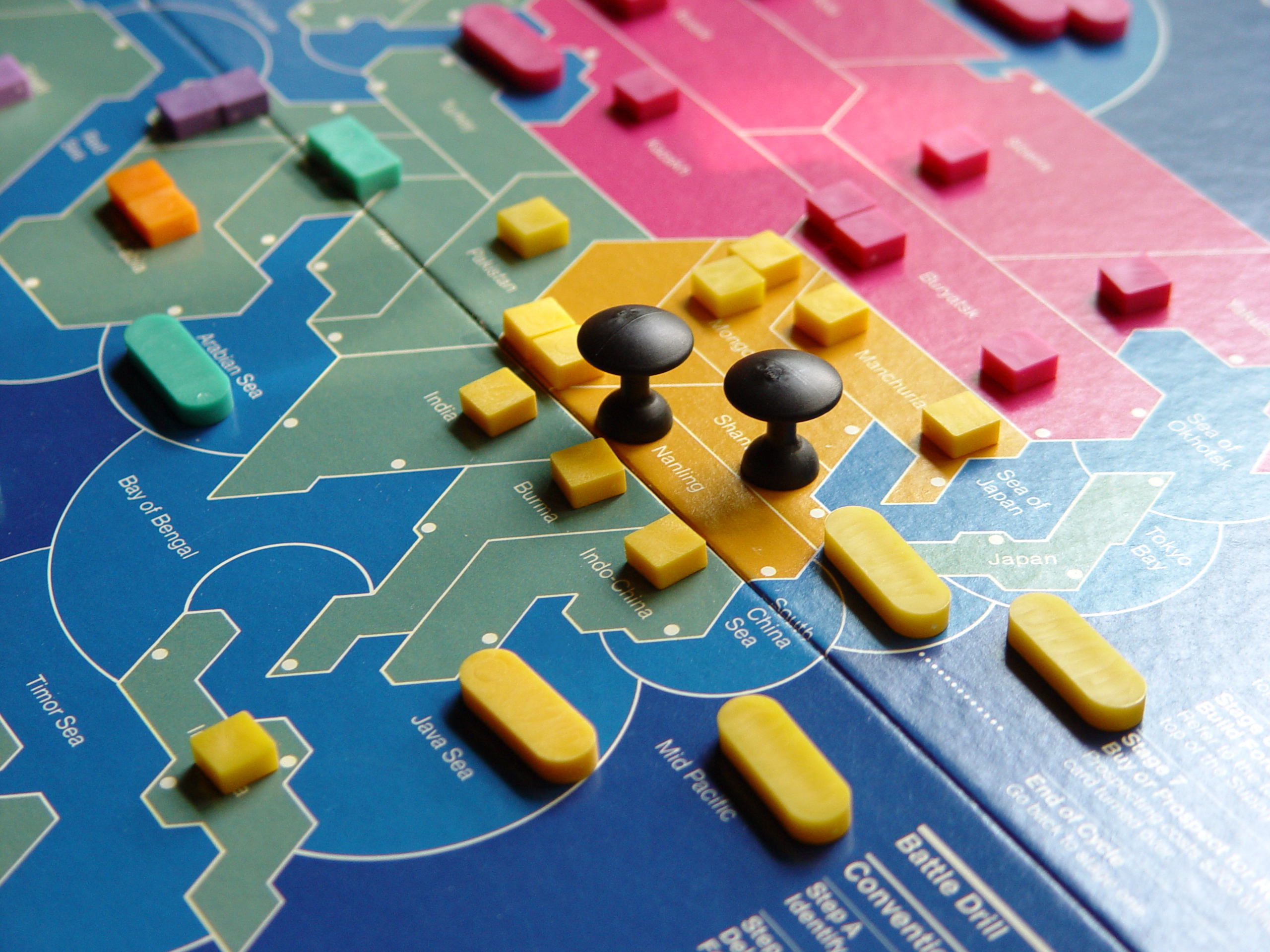 Game